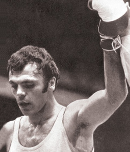 Ion Alexe